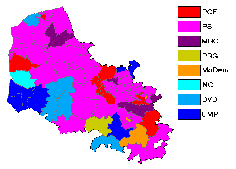 Carte du Pas-de-Calais en 2011